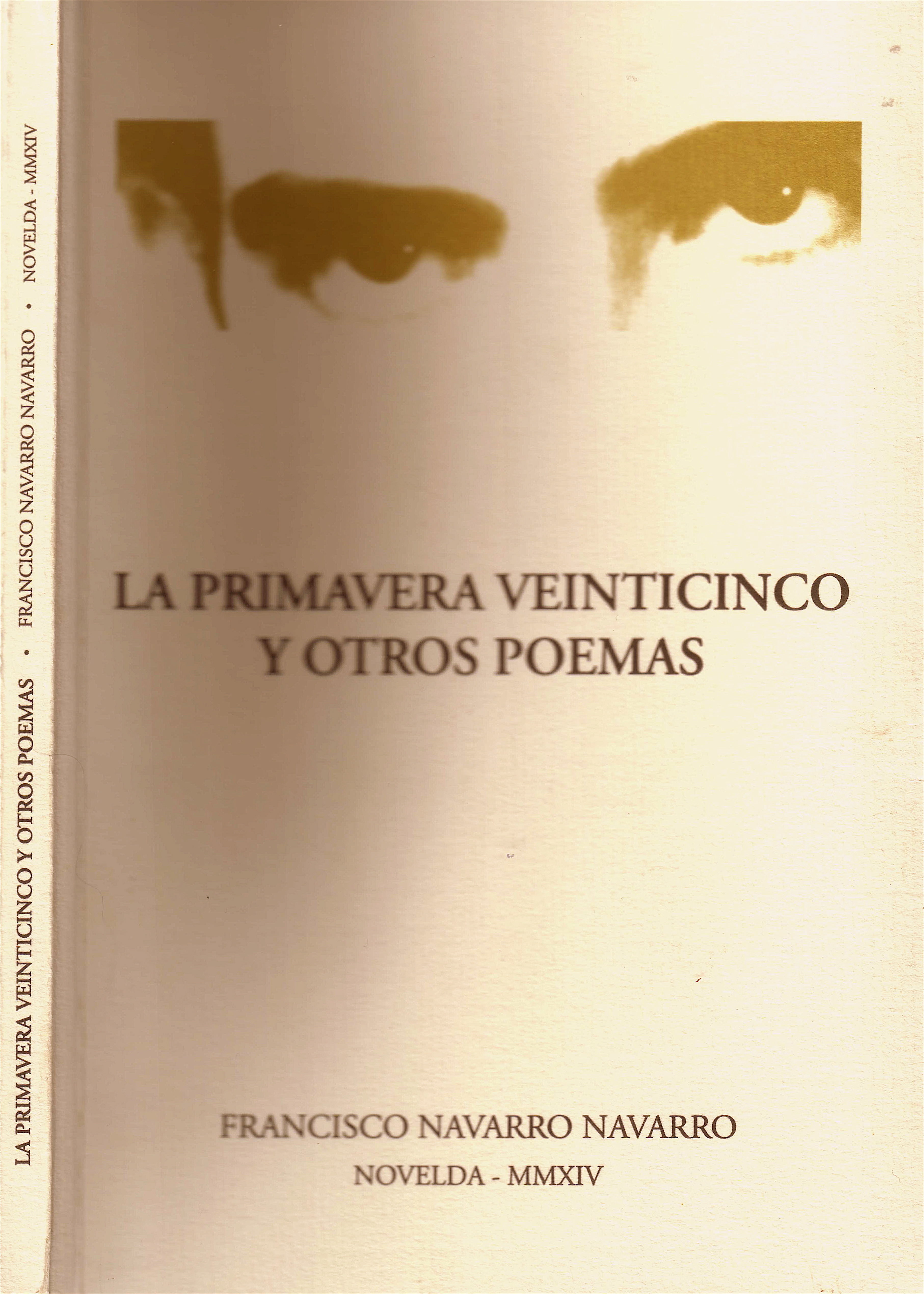 Francisco Navarro Navarro: portada de "La primavera veinticinco y otros poemas". Publicat el 2014.